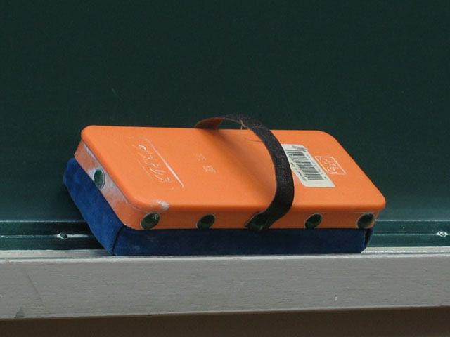 Tafelschwamm